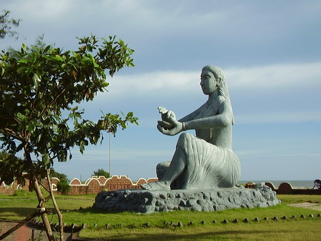 കണ്ണൂർ നഗരത്തിൽ നിന്നും ഏകദേശം എട്ടു കിലോമീറ്റർ വടക്ക് ചാലിൽ എന്ന സ്ഥലത്തുള്ള ബീച്ചിൽ സ്ഥിതിചെയ്യുന്ന ശില്പം. "അമ്മയും കുഞ്ഞും ചിപ്പിയും" എന്നു പേരിട്ടുട്ടുള്ള ഇതിന്റെ ശില്പി ബാലൻ താനൂർ ആണ്.